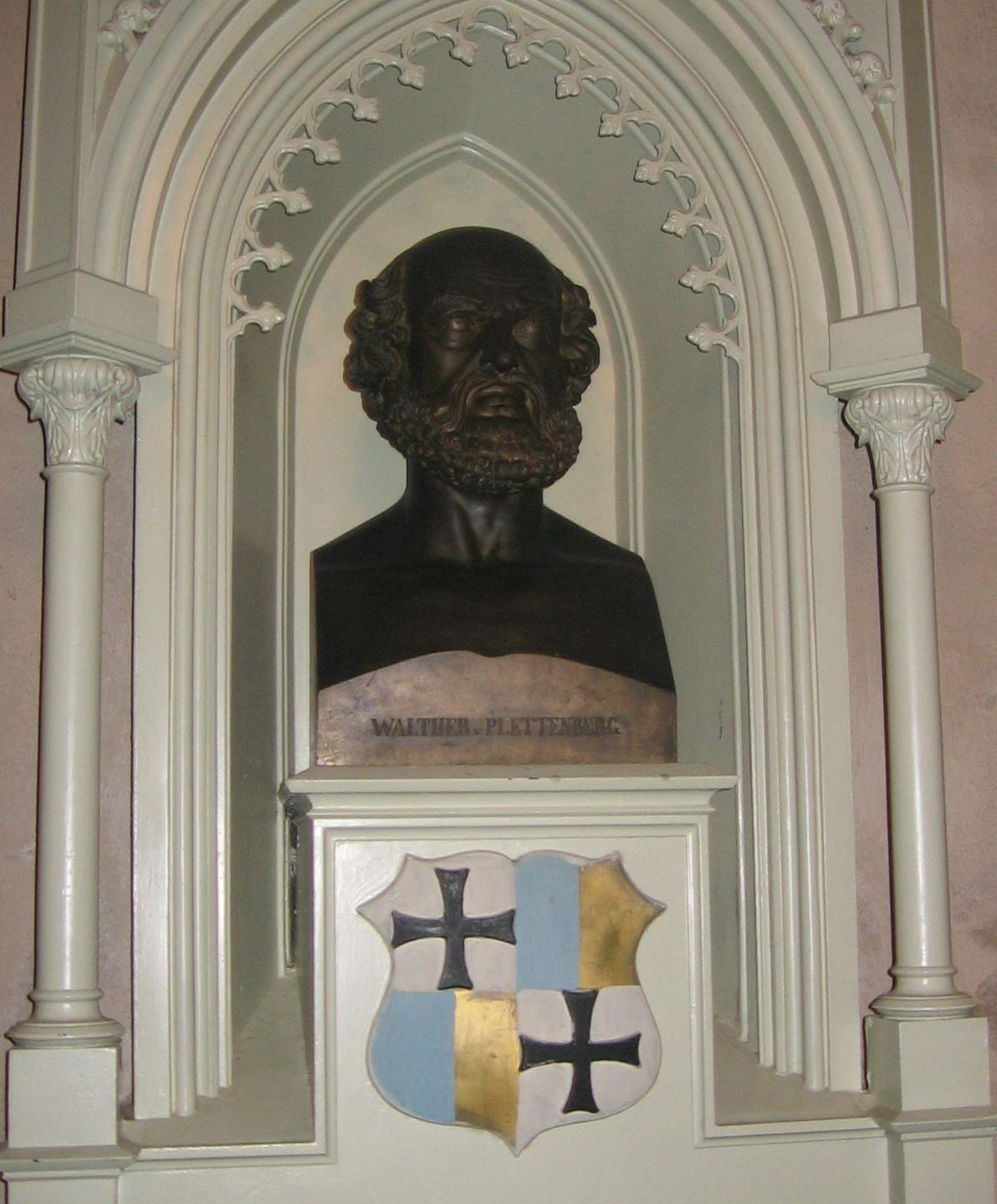 Wolter von Plettenbergi büst Võnnu (Cēsis) Jaani kirikus. Skulptor: F. Miller, 1852. Koopia Ludwig von Schwanthaler'i loodud büstist, mis asub Walhalla templis.